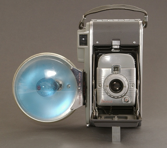 Polaroid Land Kamera Modell 80 mit Blitz Modell 281